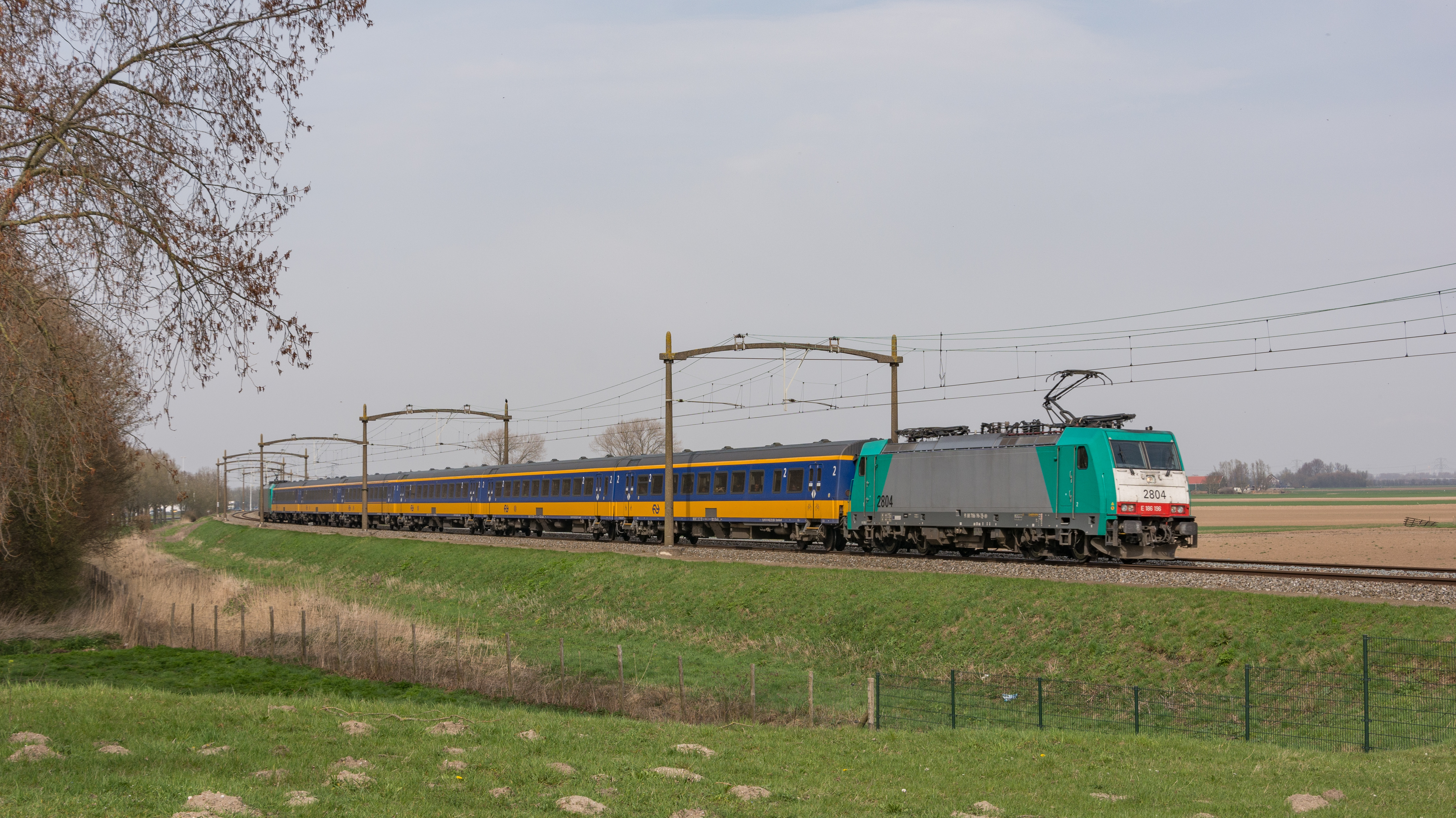 Zondag (8/4) ben ik rond Rotterdam/Den Haag geweest. Onder meer omdat het de laatste officiële dag was dat de BeNeLux treinen over het conventionele spoor via Dordrecht en Roosendaal reden. Dat wordt vanaf de komende week de HSL. Bij Willemsdorp fotografeerde ik de NMBS 2804 (186 196) - ICR-BNL-6-B10 - 2805 (186 197) in sandwichopstelling. Hier met treinnummer 9244 naar Brussel-Zuid.